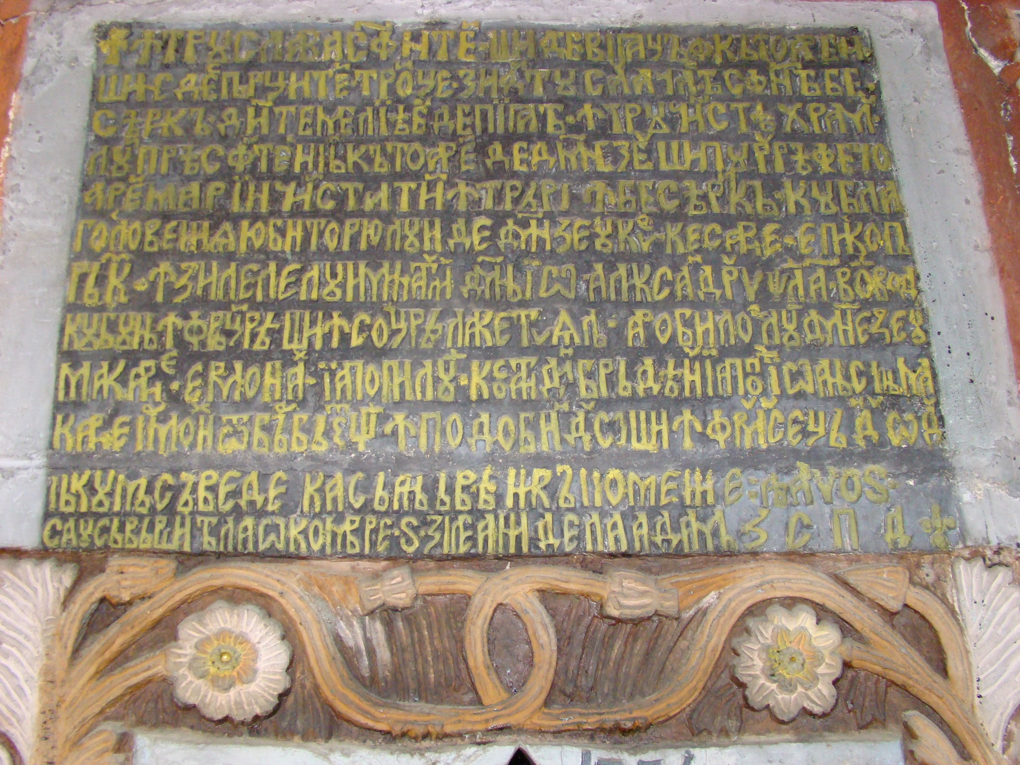 Biserica „Intrarea în Biserică a Maicii Domnului” sat Bărbătești, cătun Mierlești, județul Vâlcea